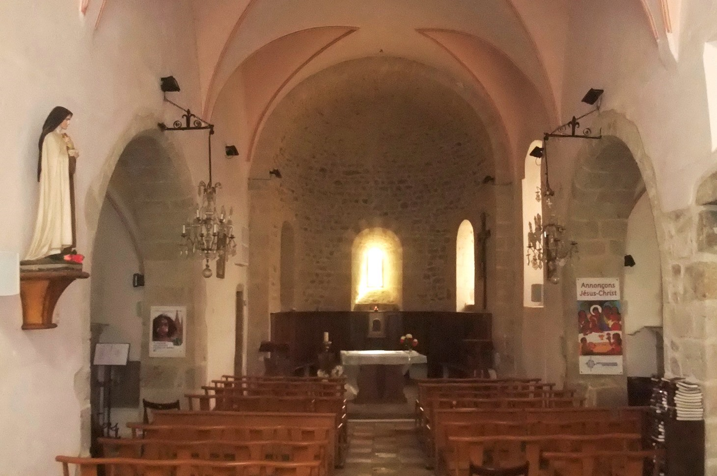 Saint-Clair (Ardèche) église intérieur